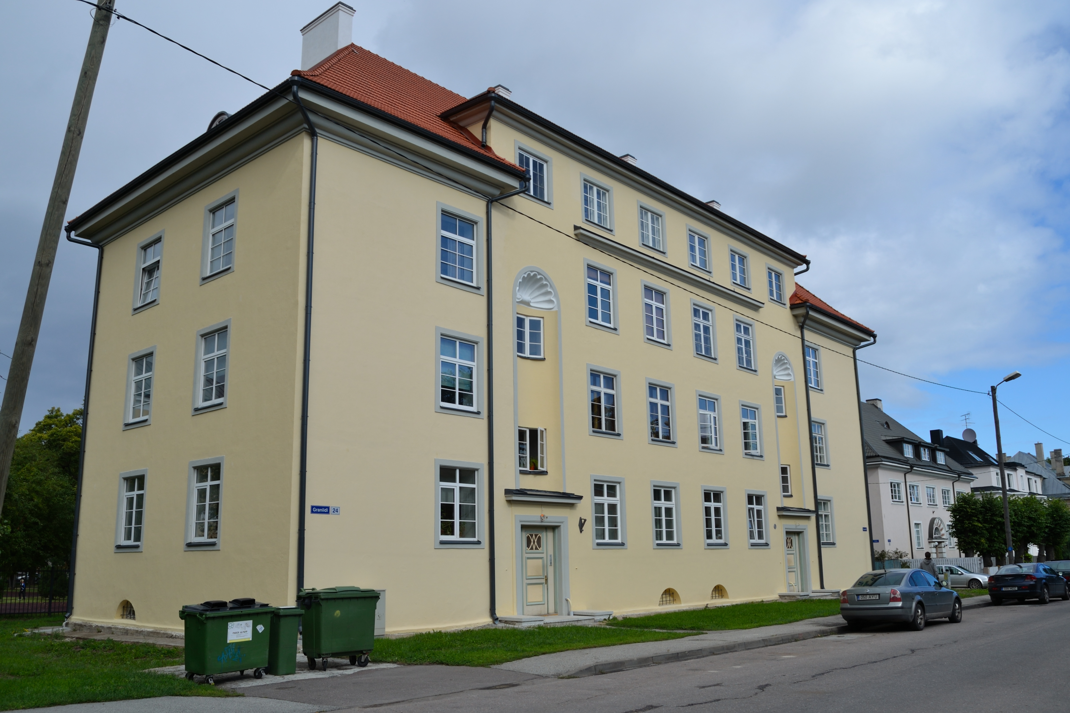 Tallinn, elamu Graniidi 24, 1924